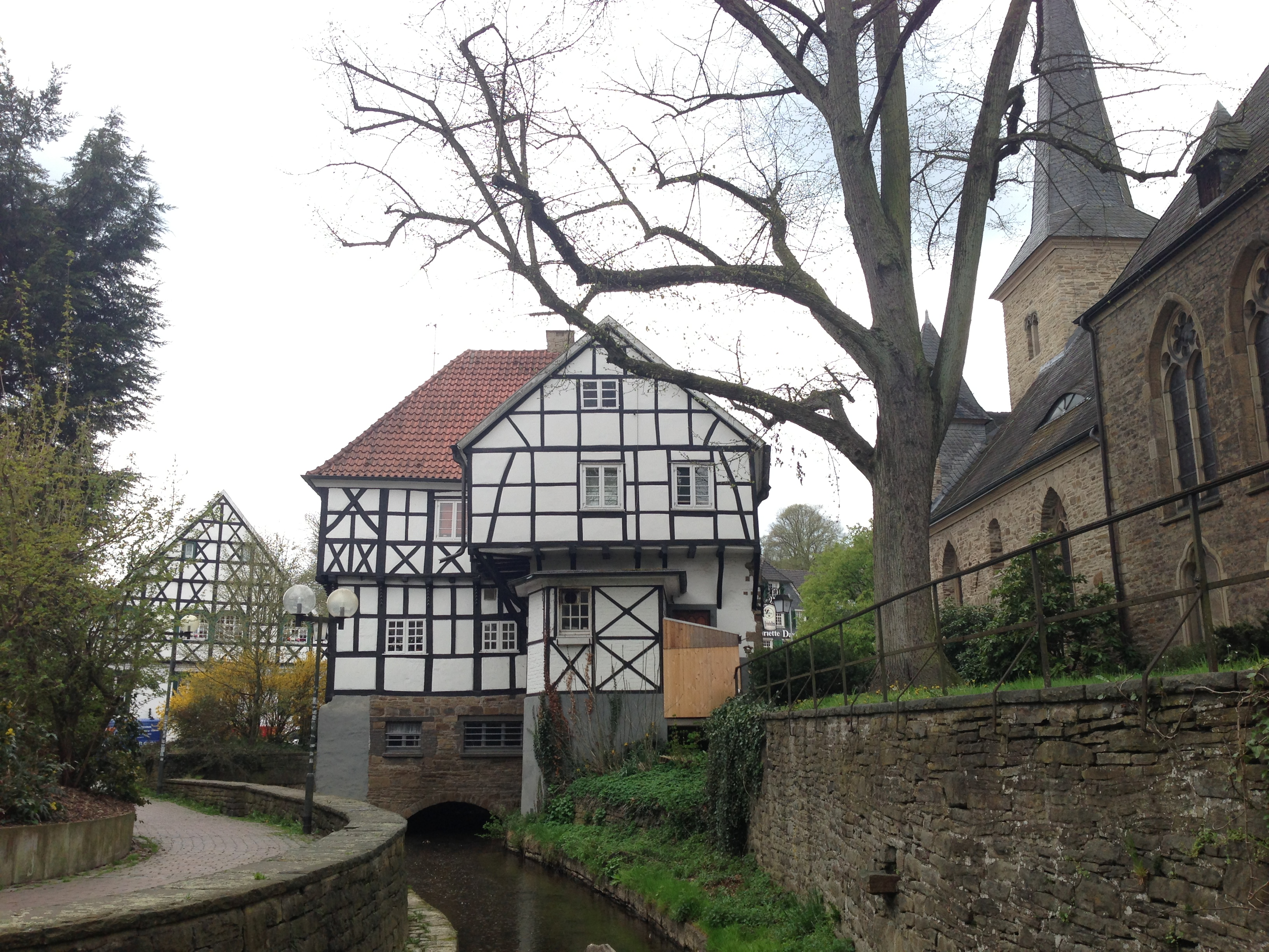 Wetter-Wengern, Leimkasten und Dorfkirche an der Elbsche